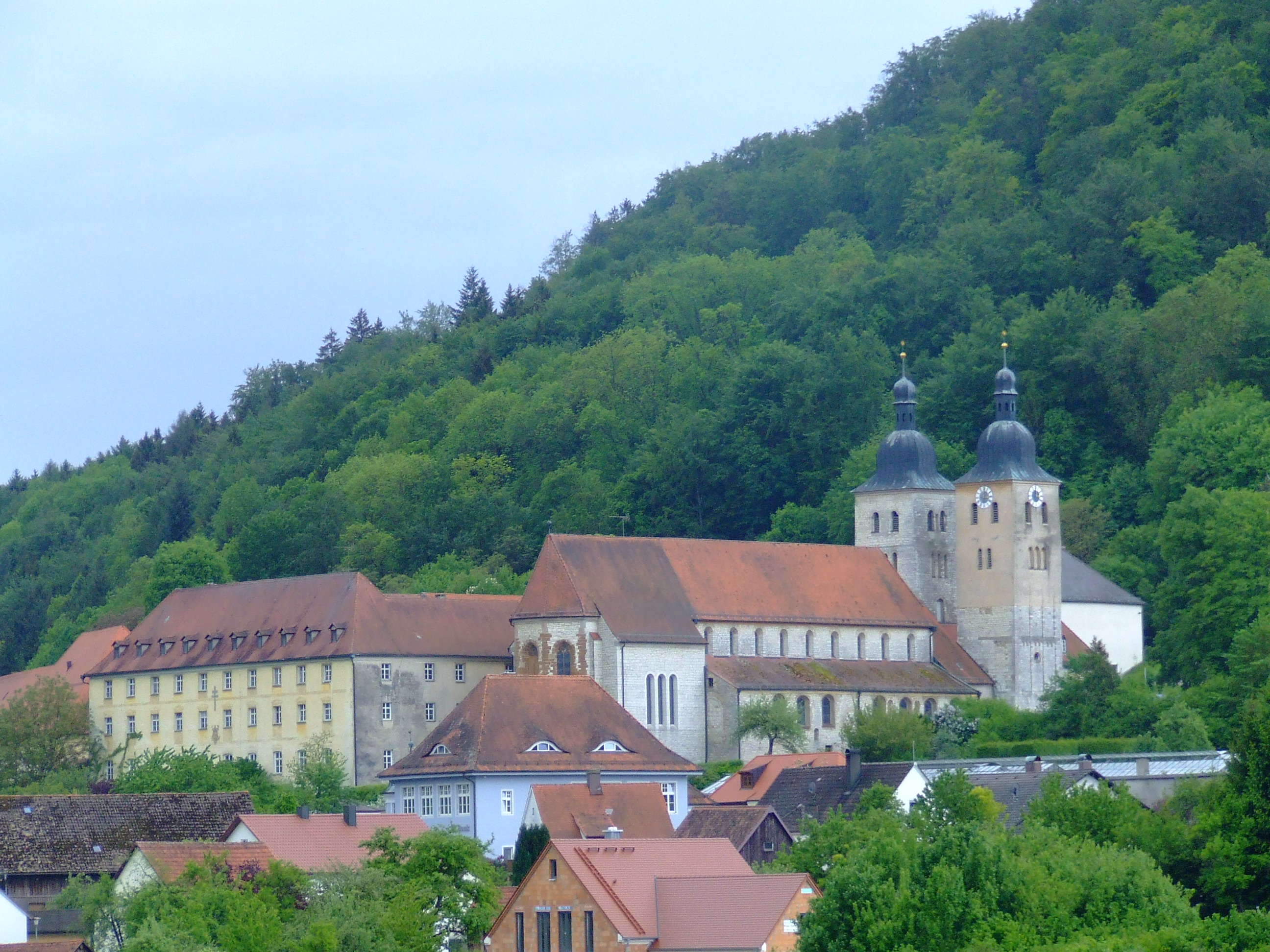 Das Kloster Plankstetten bei Berching, Kreis Neumarkt.